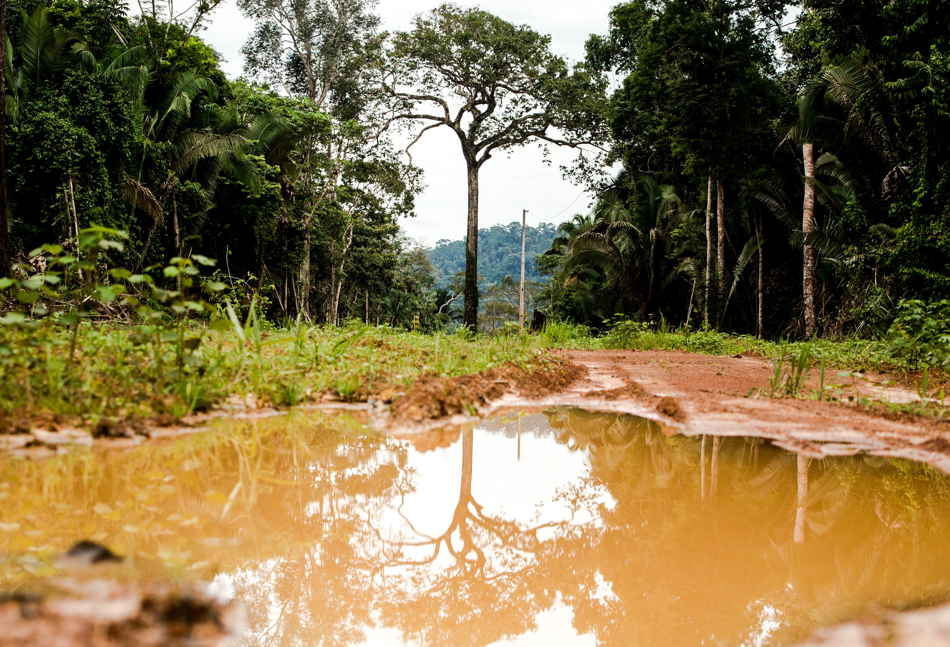 Área degradada no município de Colniza, noroeste de Mato Grosso (Marcelo Camargo/Agência Brasil)